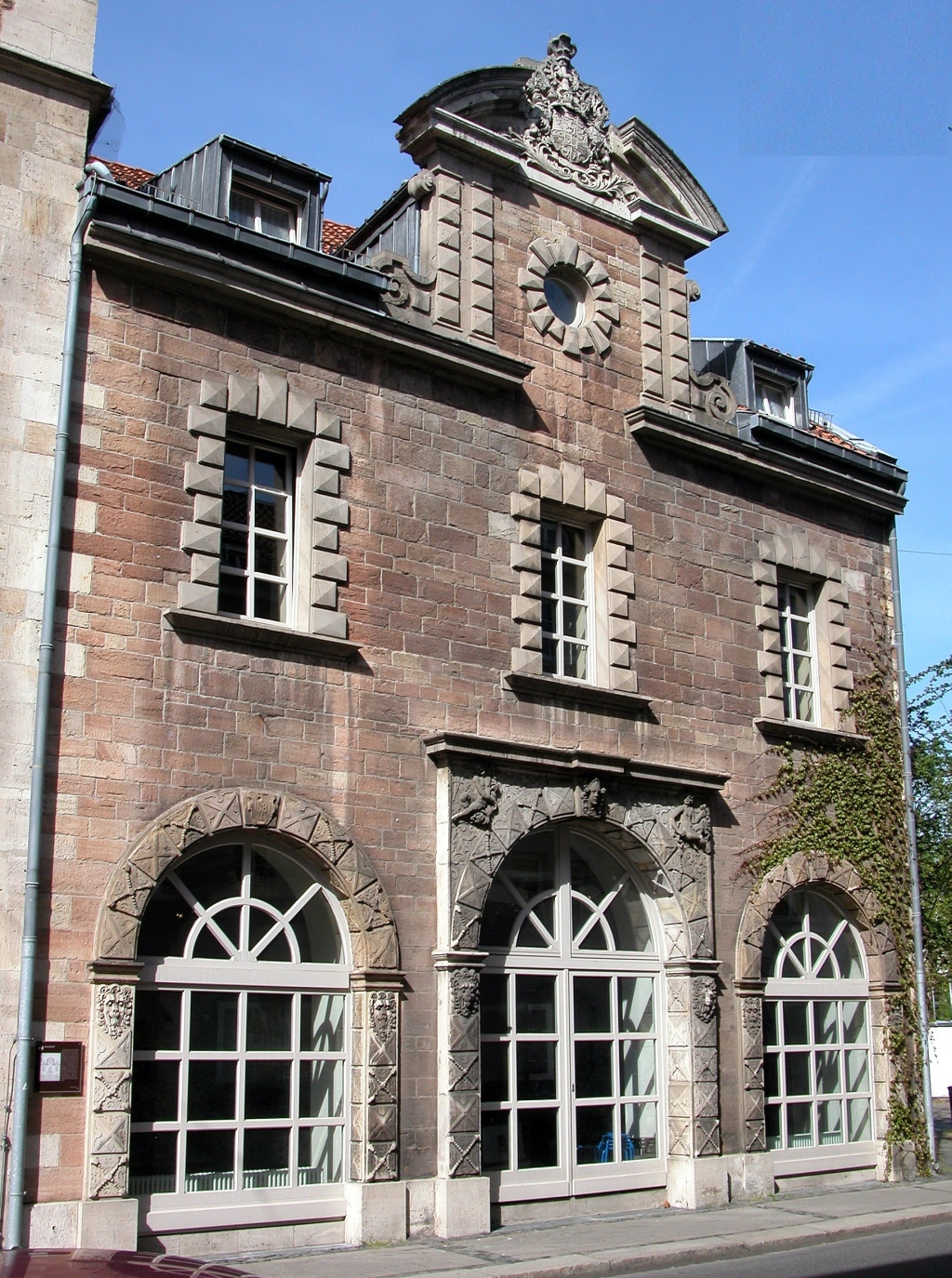 Braunschweig: Autorshof – Gesamtansicht von Nordosten. Braunschweig, Germany: Autorshof – total view from the norteast.